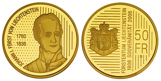 50 Liechtenstein franc, gold coins featuring Johann I Joseph, Prince of Liechtenstein